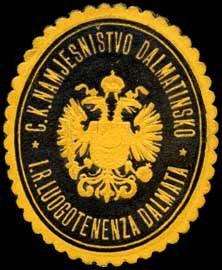 Sealing stamp Title: C.K. Namjesnistvo Dalmatinsko - I.R. Luogotenenza Dalmata Description: gelb, schwarz, geprägt Place: size: 4x4 cm